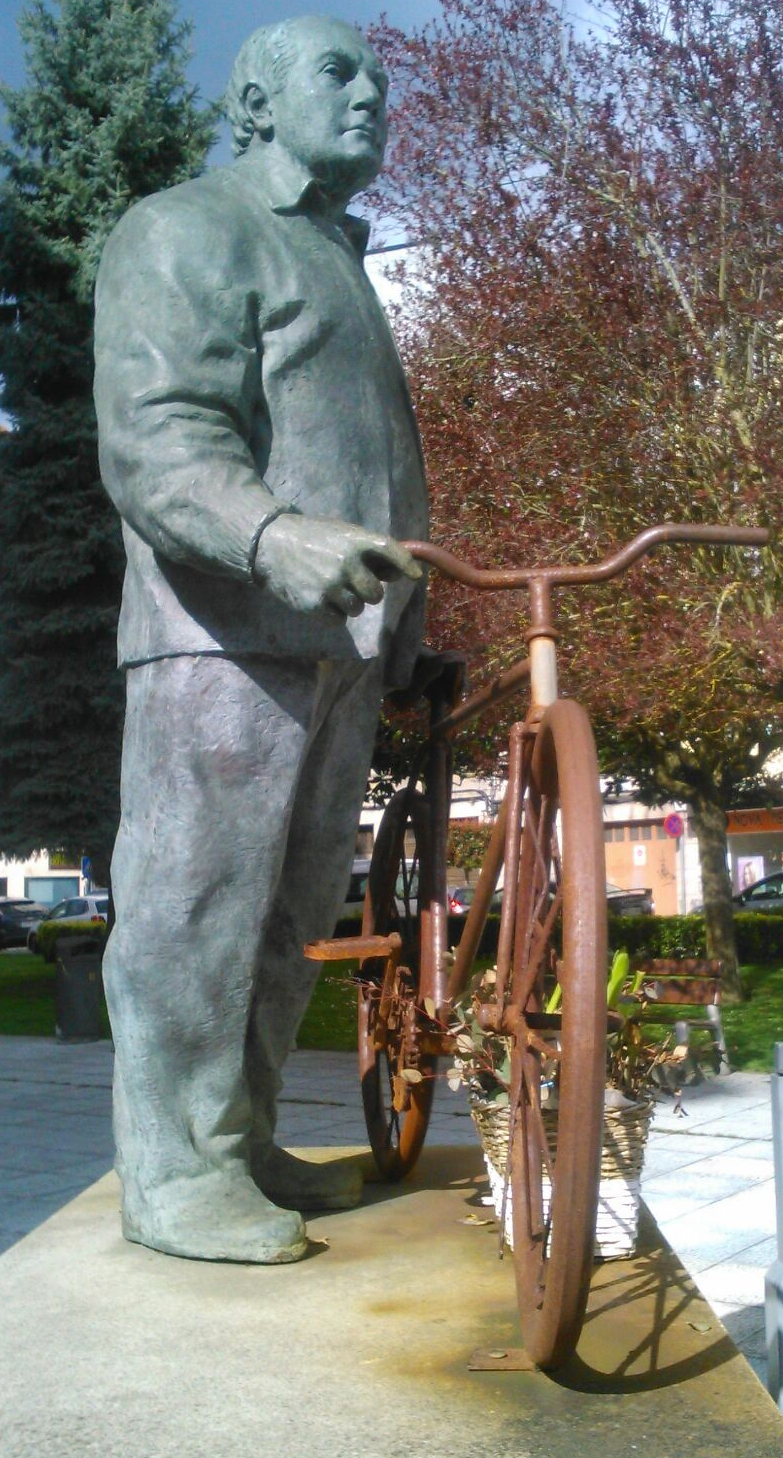 Estatua de Antonio Gandoy en Fonte do Rei, Lugo, realizada por Juan Puchades Quilis.